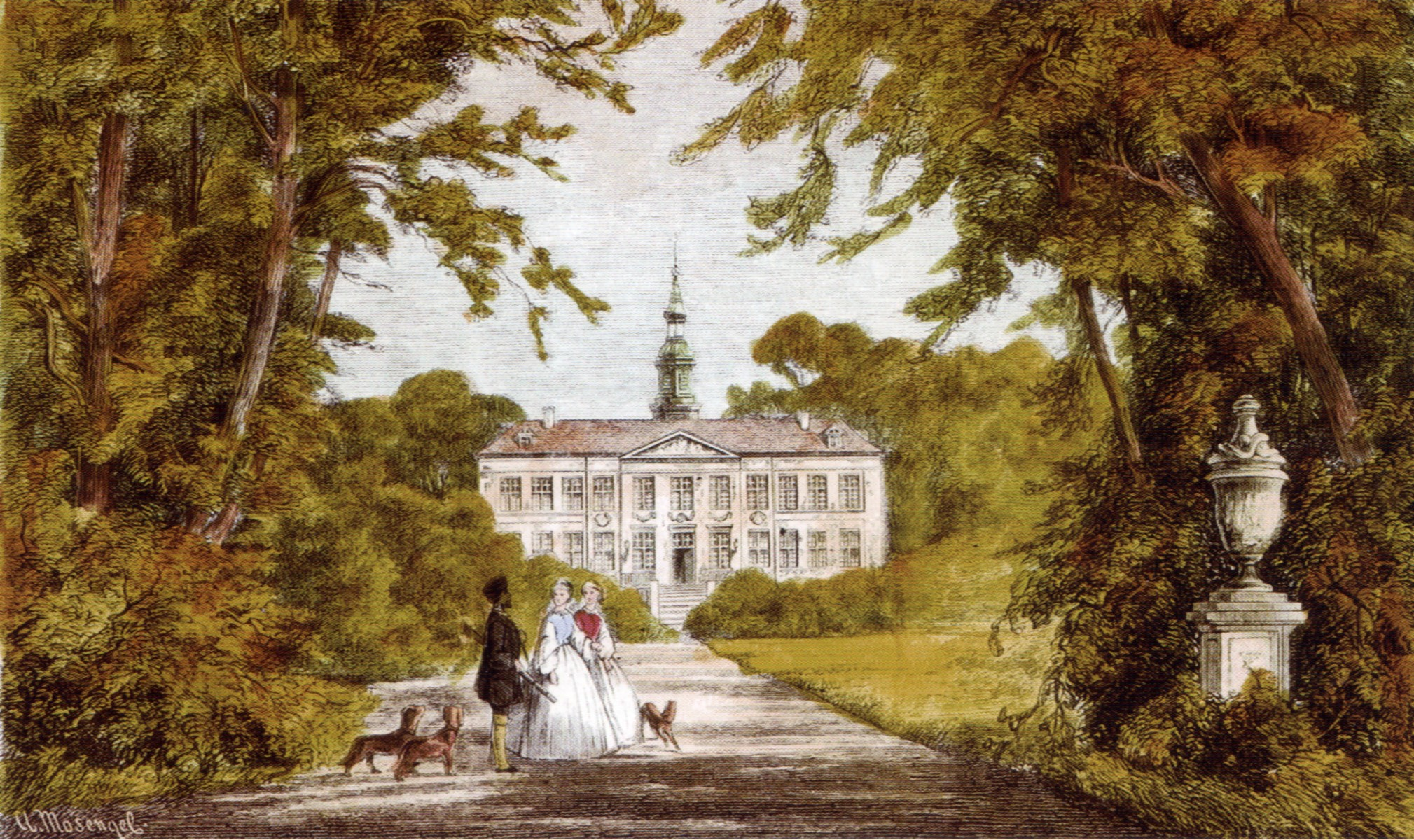 Wandsbeker Schloss, vermutlich Südansicht, kolorierte Zeichnung von Adolf Mosengel